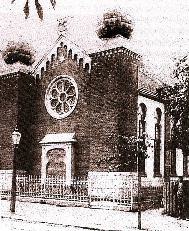 Ehemalige Synagoge in Lewin Brzeski